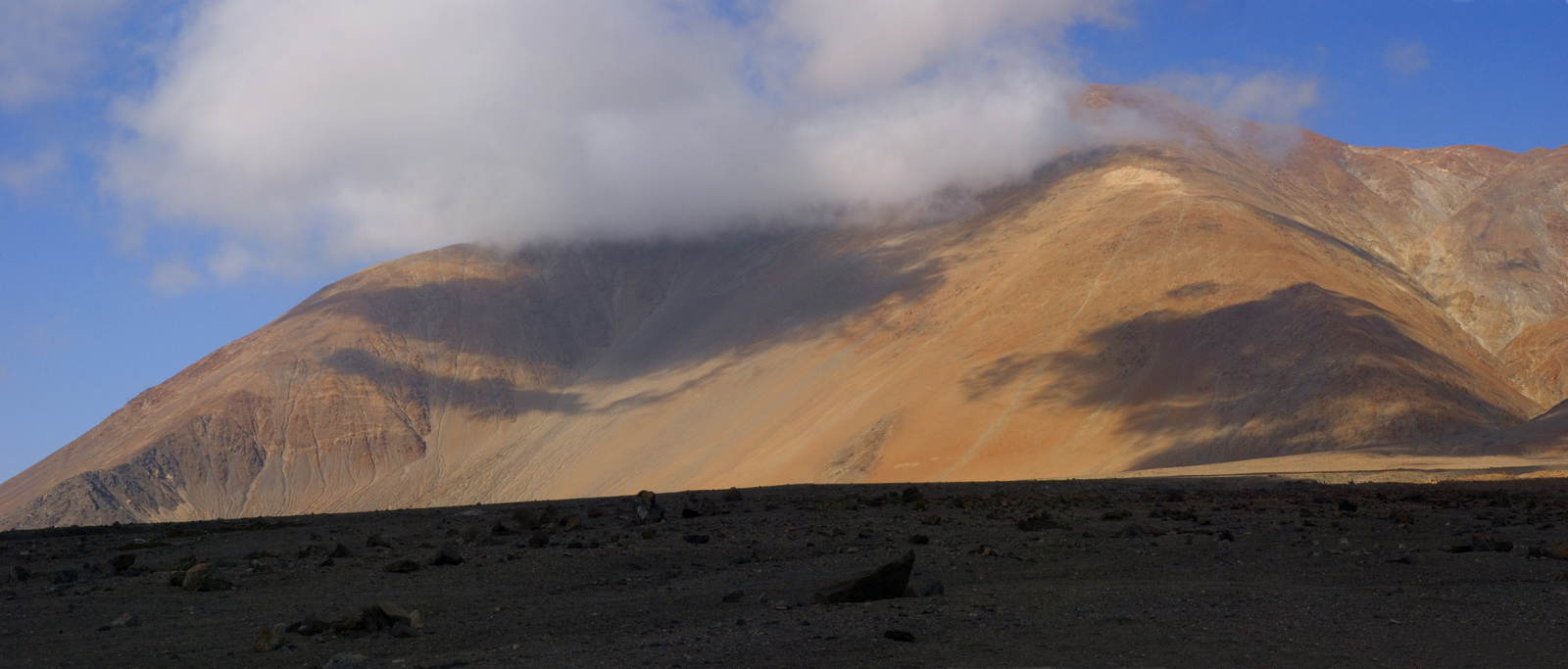 Morro Moreno el 18 de agosto de 2010